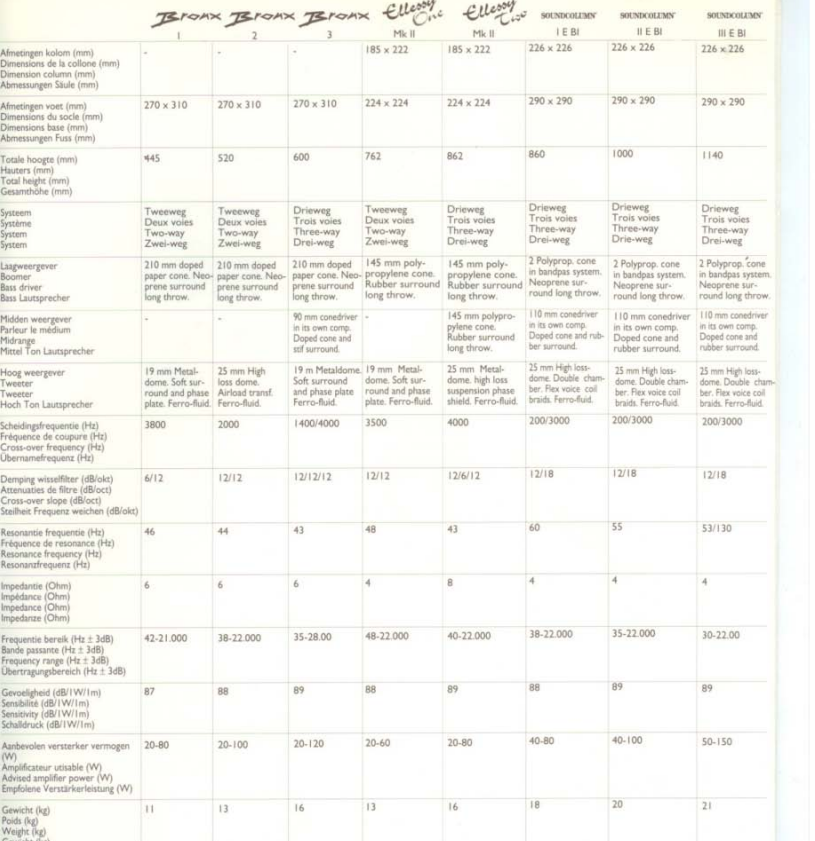 Officiële specificaties van de BNS Souncolumn, Bronx en Ellessy. Gehaald vanuit een informatieboekje van BNS.